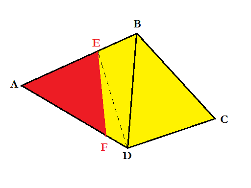 Spianamento orizzontale di quota assegnata